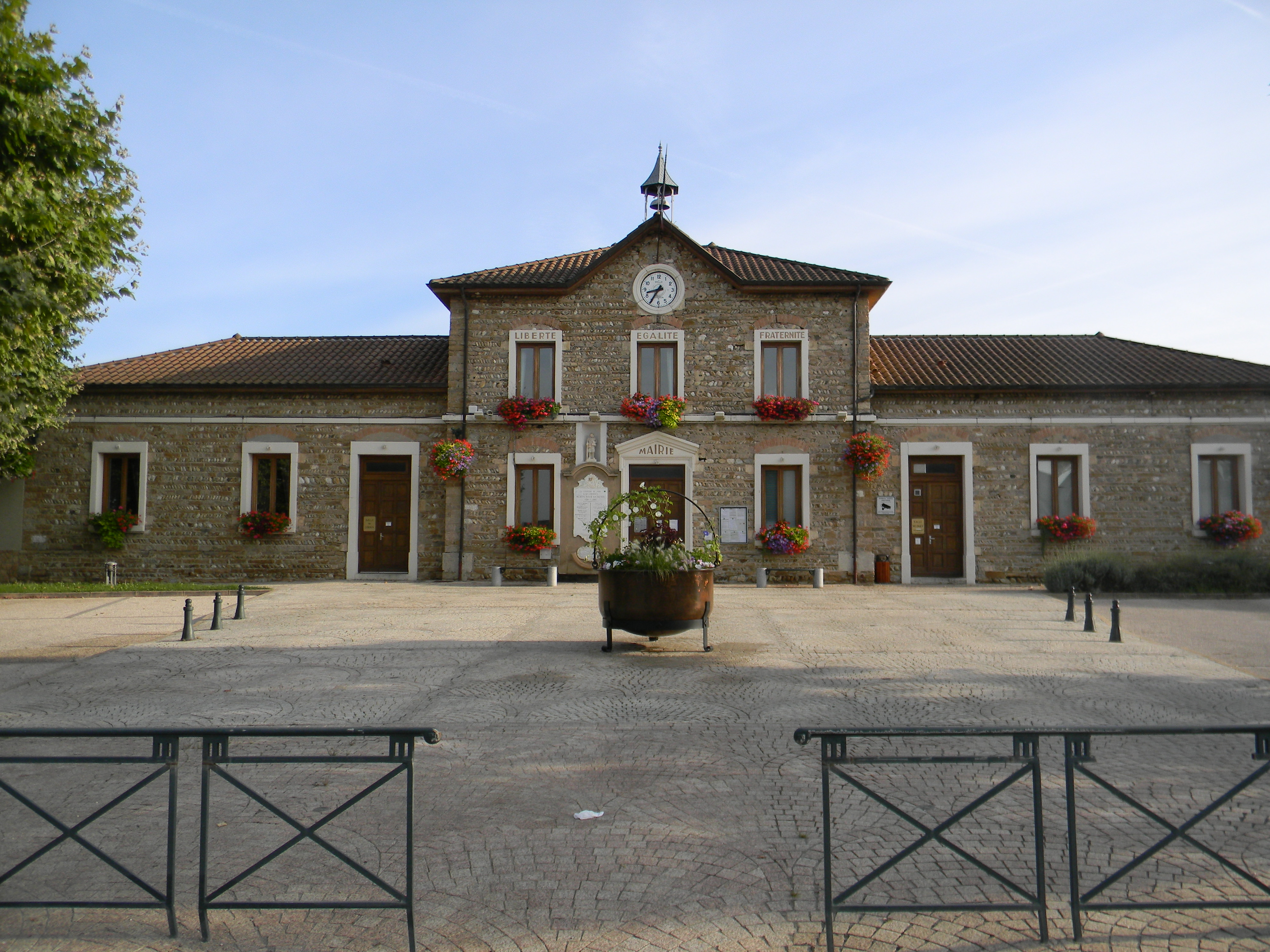 Mairie de Jons vue de face.